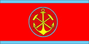 Флаг Министра геологии СССР учрежден постановлением Совета Министров СССР от 3 мая 1983 года.